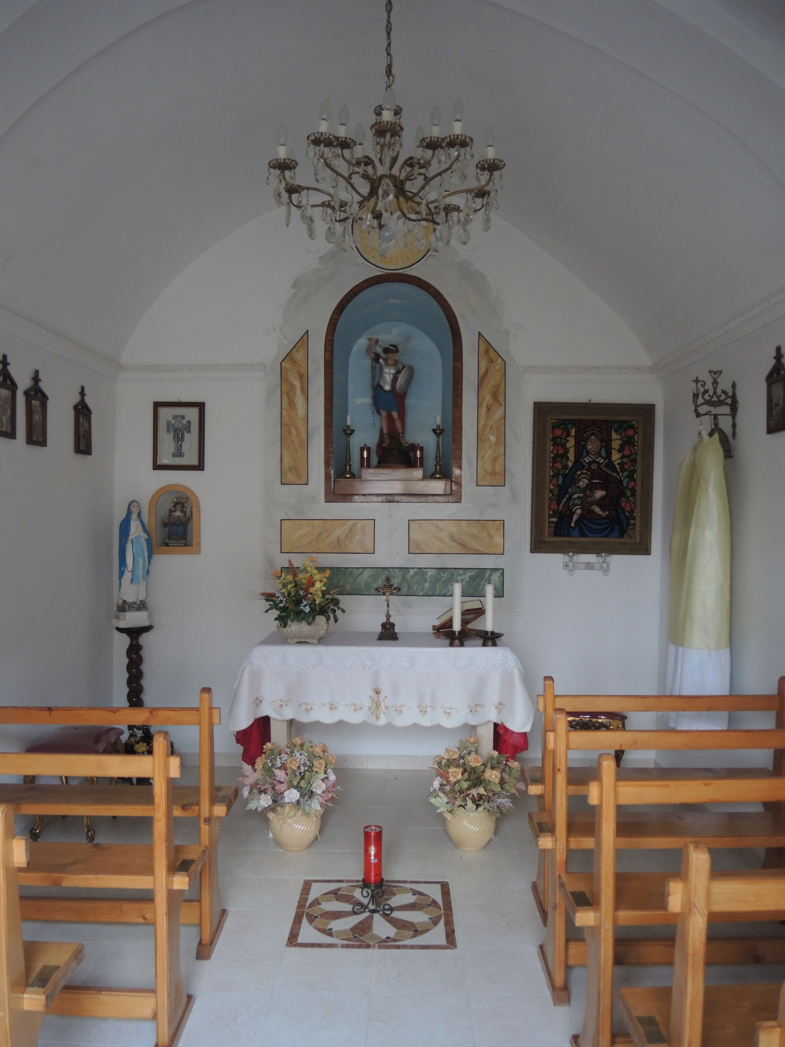 Villalago